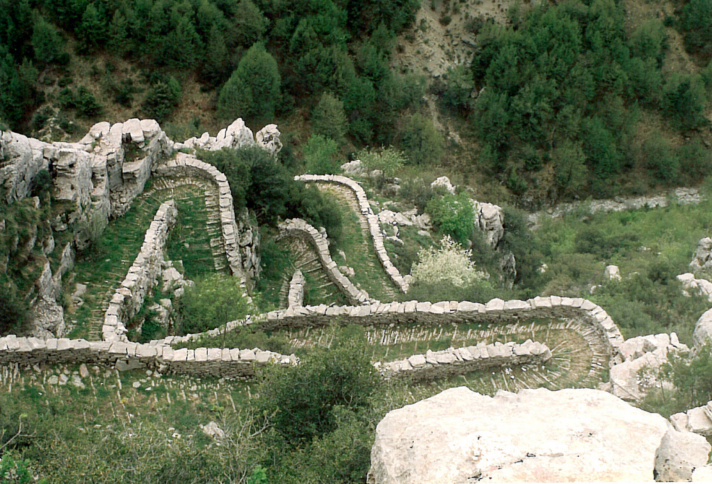 Ζαγοροχώρια-Σκάλα Βραδέτου, ίσως το πιο εντυπωσιακό μονοπάτι στην Ελλάδα, χαραγμένο και χτισμένο σε απότομη πλαγιά.